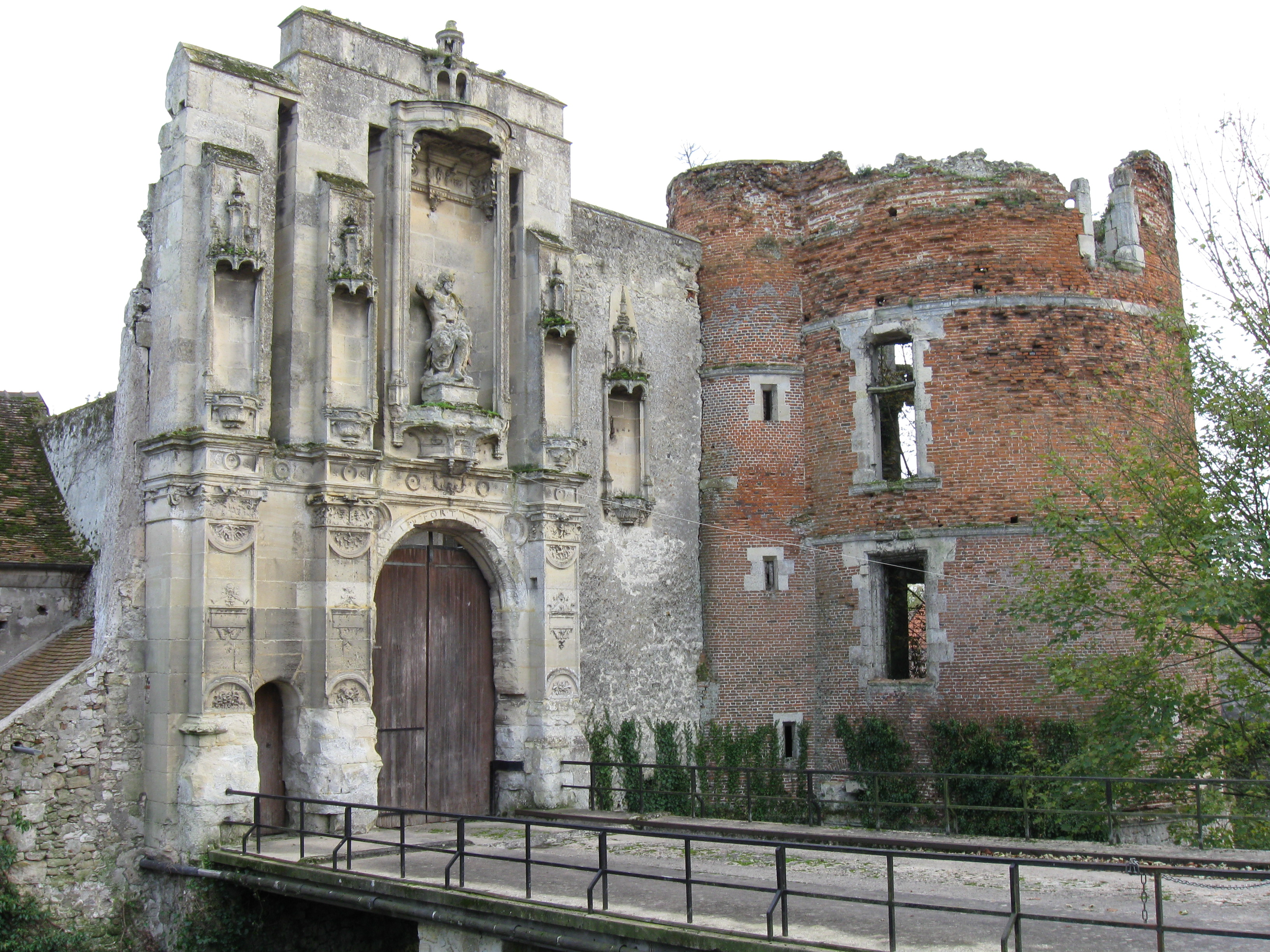 Porche du château de Nantouillet. (département de la Seine et Marne, région Île-de-France).